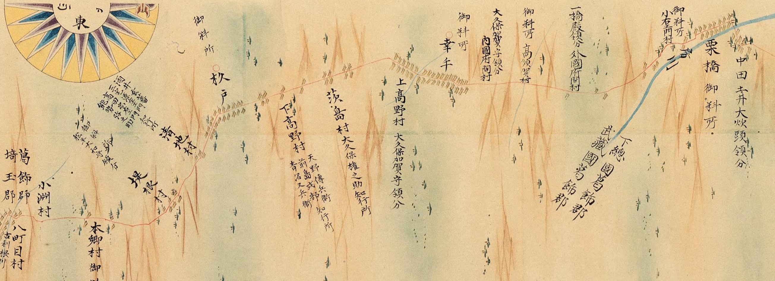 〔大日本沿海輿地全図 〕. 第87図 下野・下総・武蔵(武蔵・草加・下総・古河・下野・小山)をもとに、改変。 栗橋・中田周辺の状況。